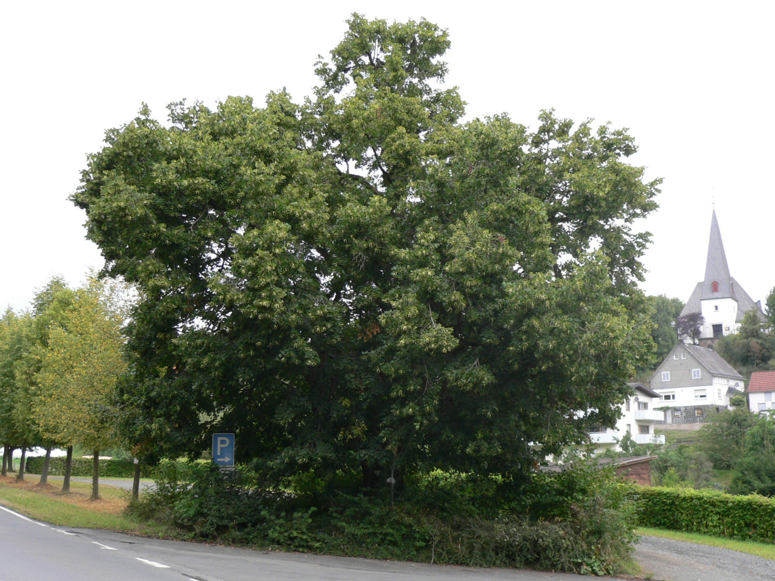 Kaiserlinde in Wommelshausen, Bad Endbach